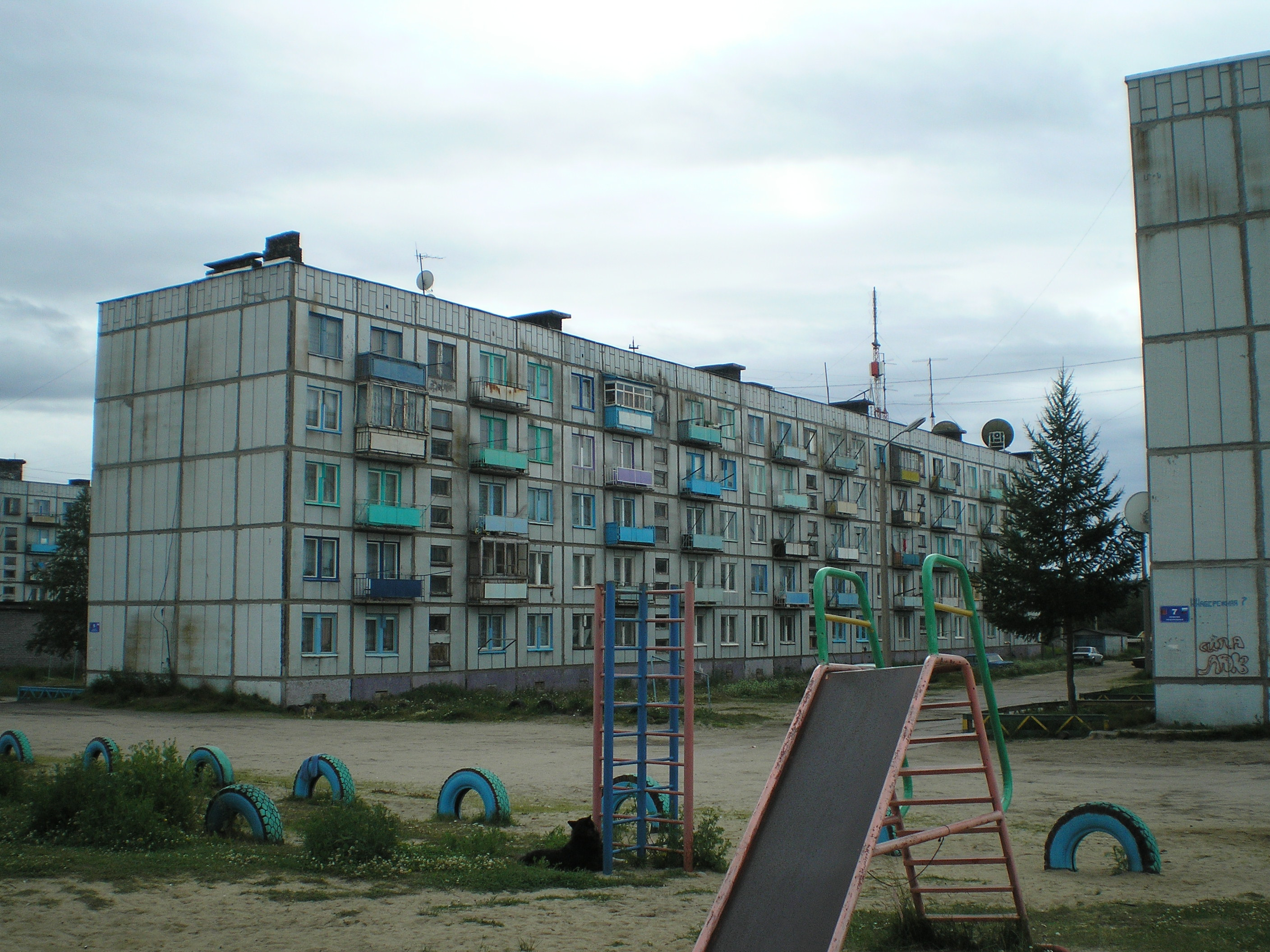 Дом в Алакуртти